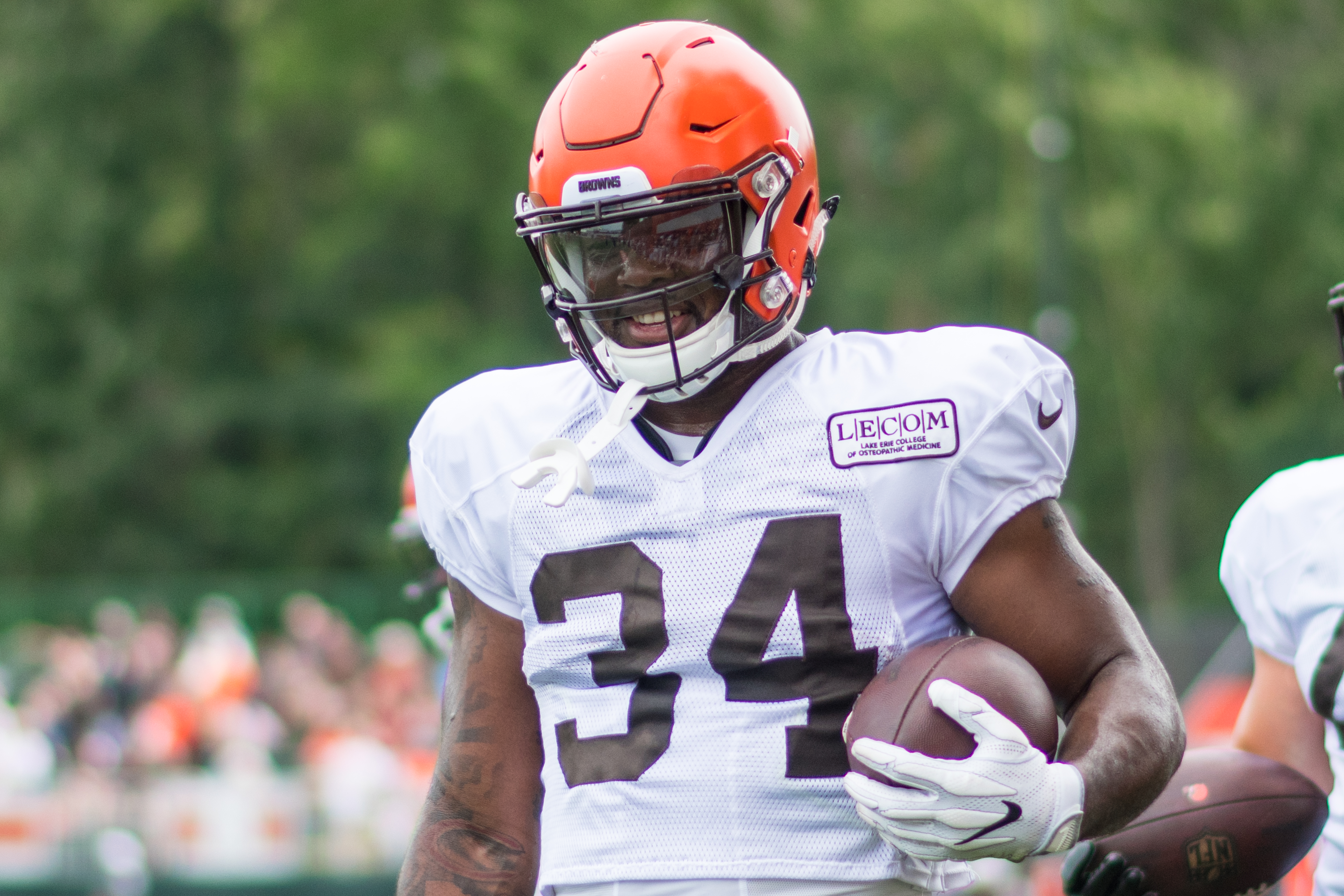 Carlos Hyde